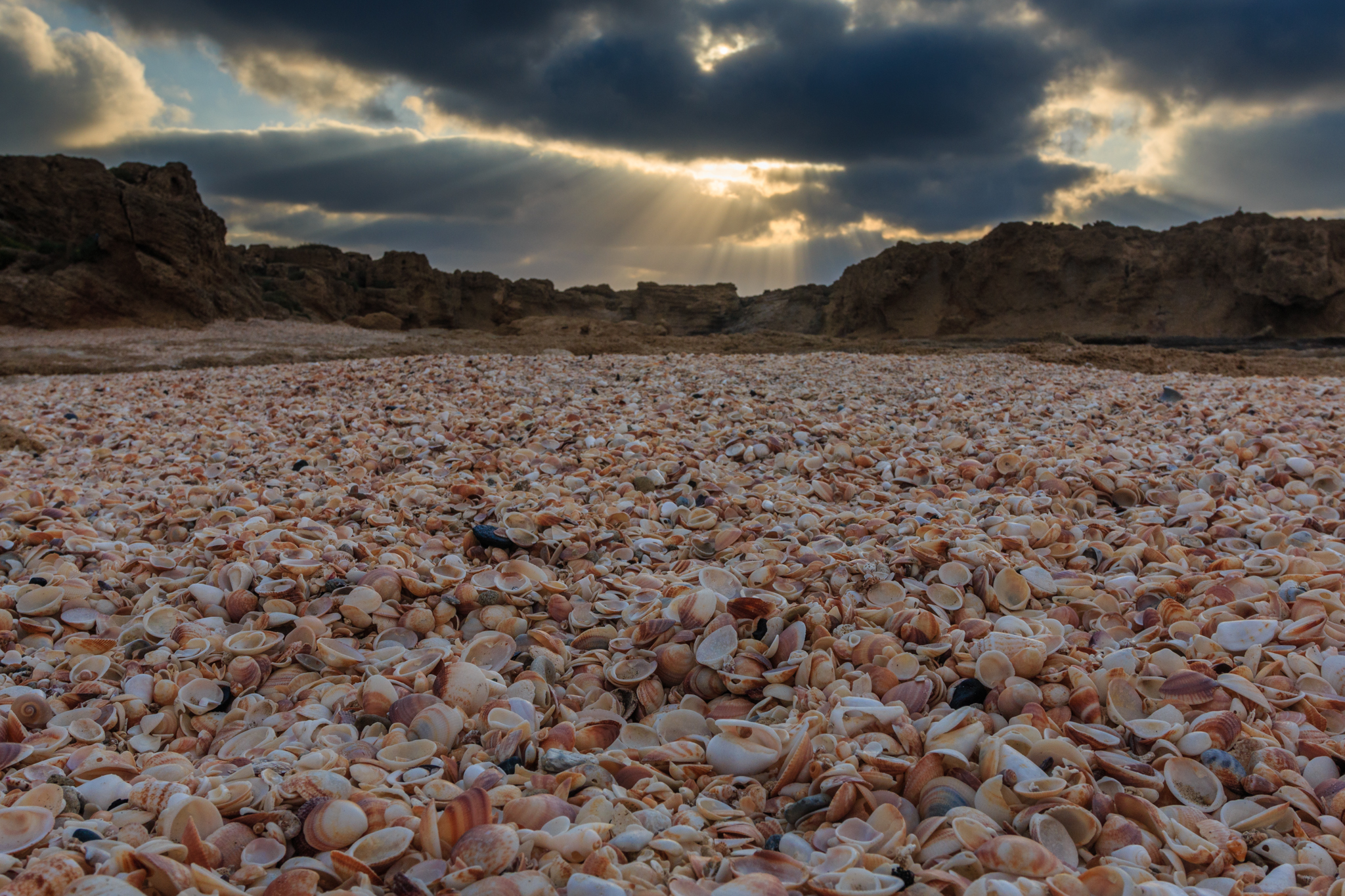 חוף דור הבונים: היא רצועת חוף באורך של 4.5 ק"מ המשתרעת ממושב הבונים בצפון ועד לאזור מושב דור ומכאן שמה. רצועת החוף כוללת את חוף הבונים ואת חוף דור המוכר לציבור גם בשמו הישן, חוף טנטורה.